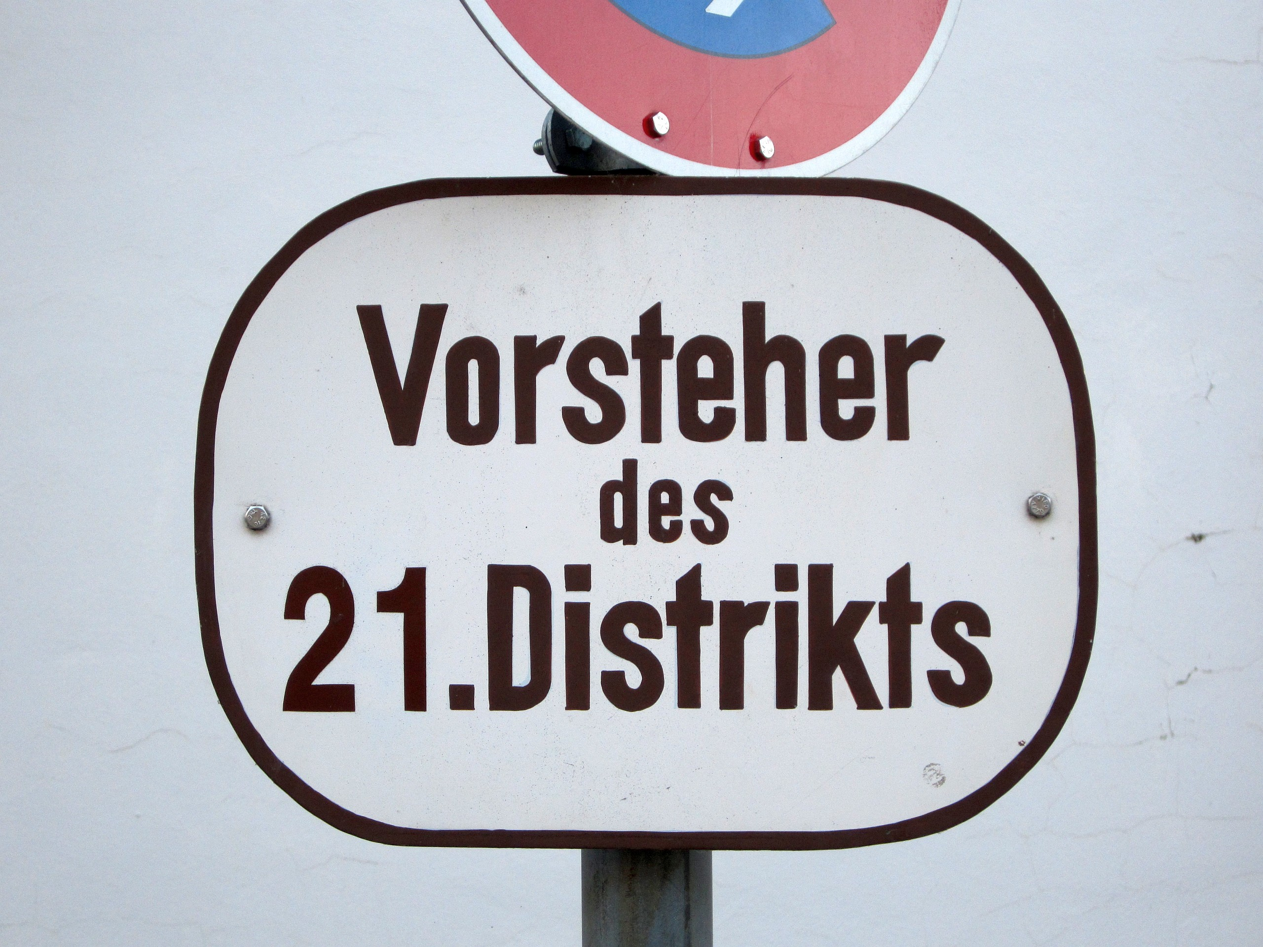 Schild "Vorsteher des 21. Distrikts" in Bayreuth, Karl-Marx-Str. 5